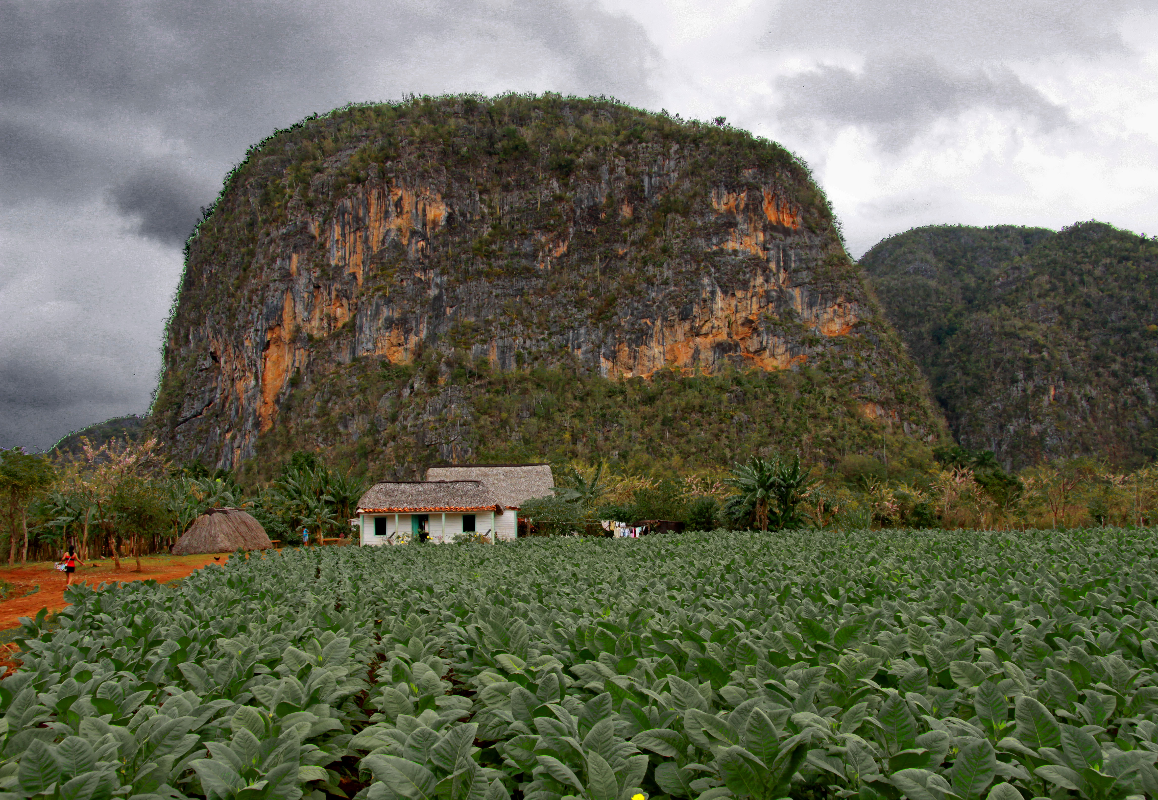 Viñales. Champ de tabac dans la vallée.